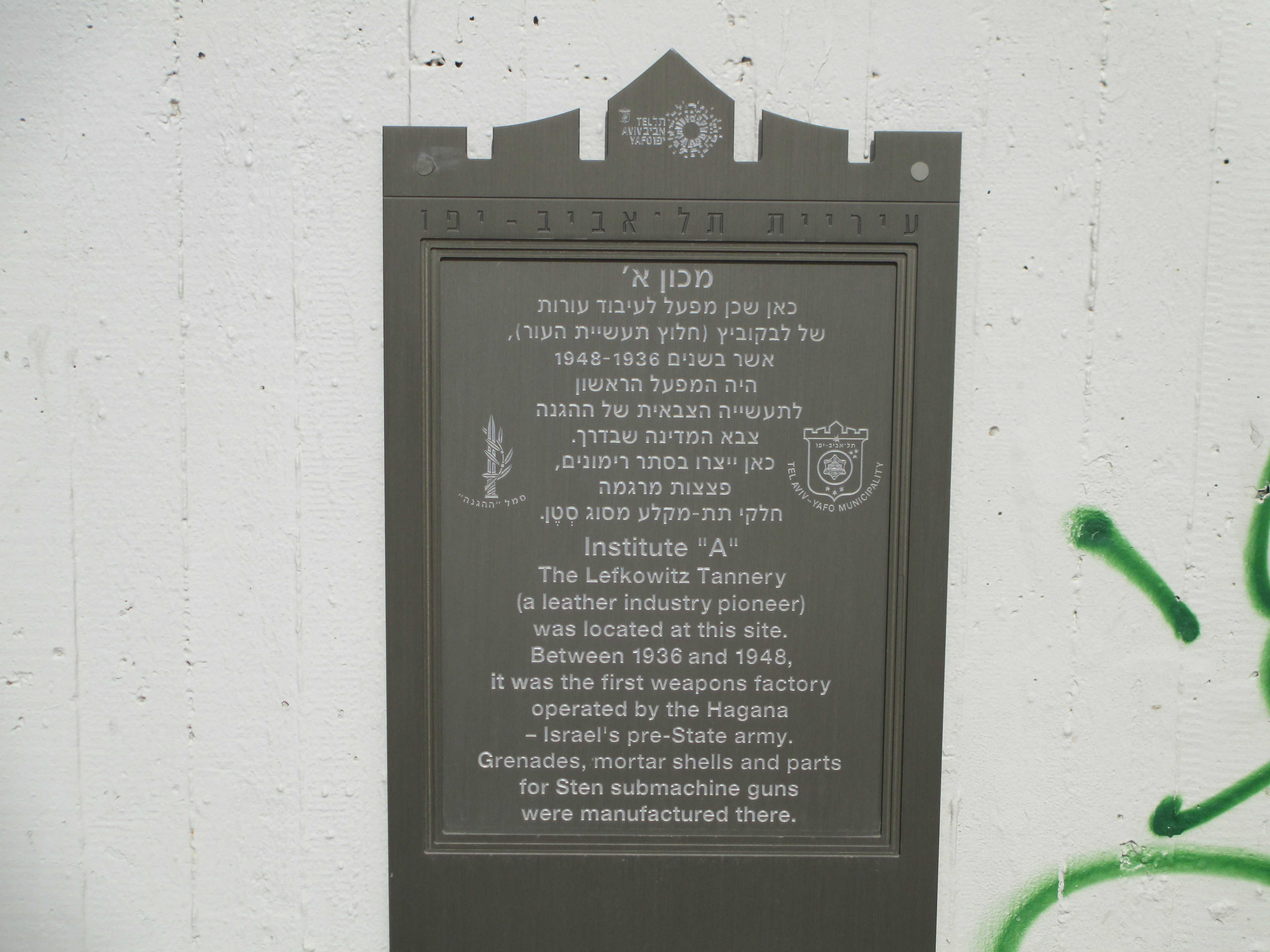 לוחית זיכרון למפעל א' של ההגנה, רח' הירקון 121 ליד מלון רנסנס